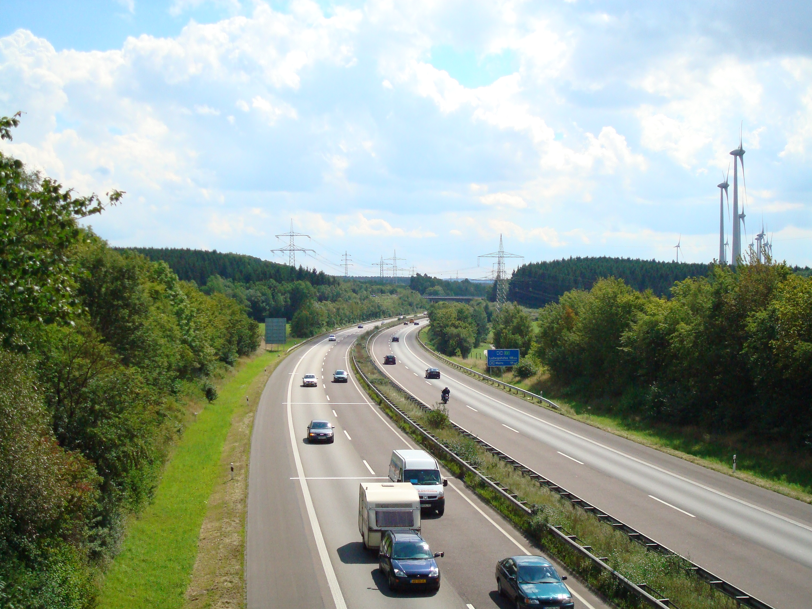 Bundesautobahn A 61 bei Wiebelsheim; rechts WKA des Windparks Kisselbach, hinten u.a. Kreuzung der 380-kV-Leitung Rommerskirchen–Bürstadt–Hoheneck (hier Bl. 4512)